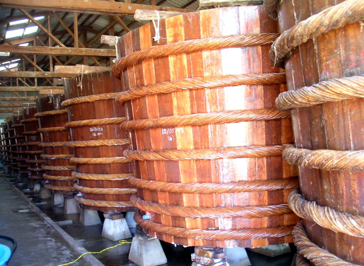 Fabrication de nuoc mam (saumure de poisson)